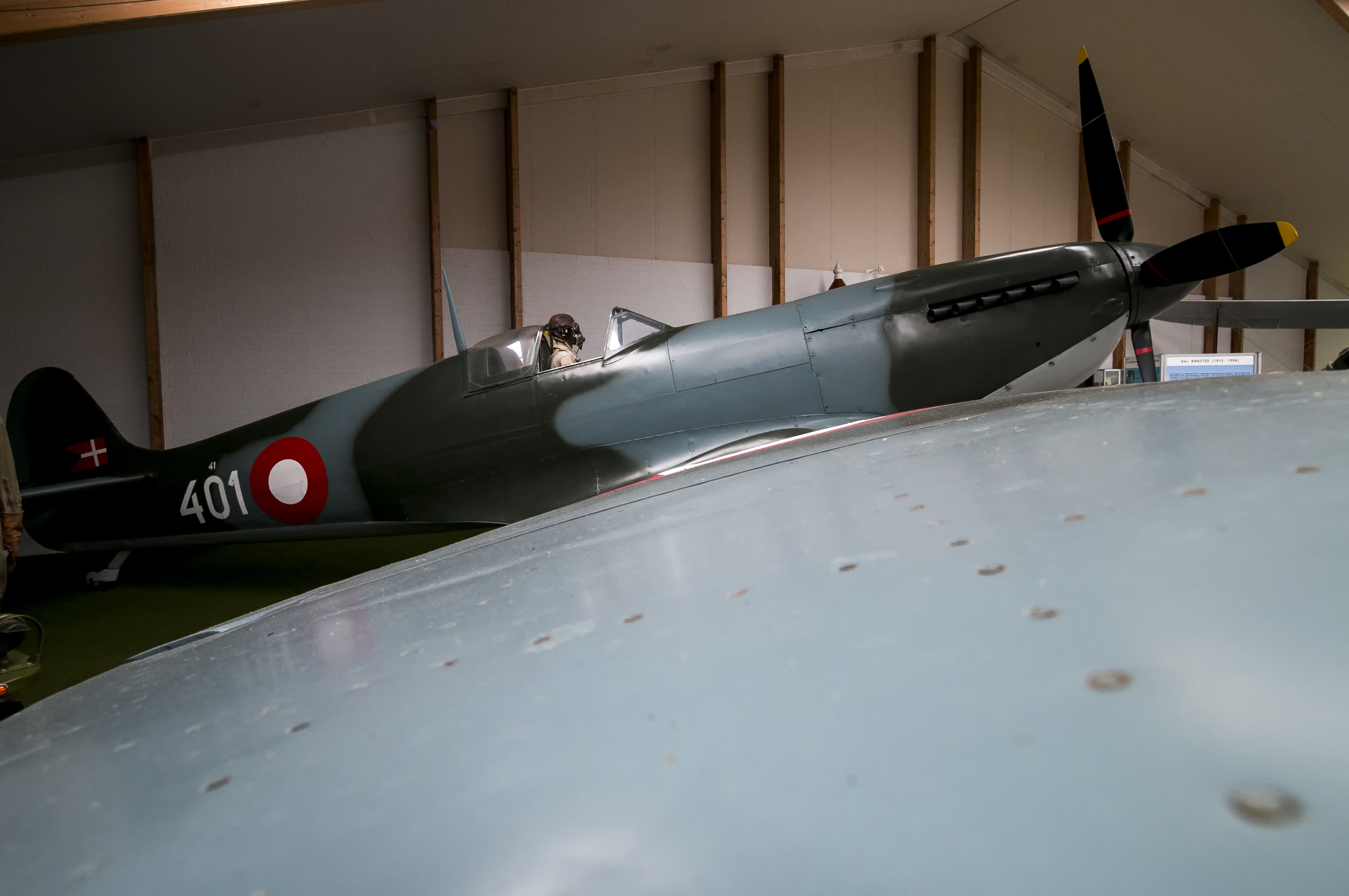 Danmarks Flymuseum, Stauning - Spitfire